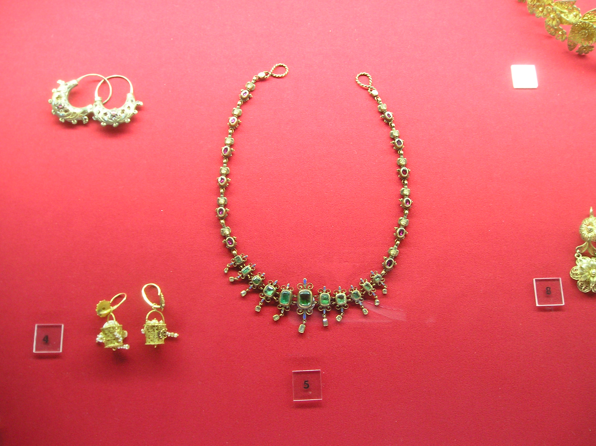 Gioielli - Museo Archeologico Regionale Paolo Orsi - Siracusa - Sicilia